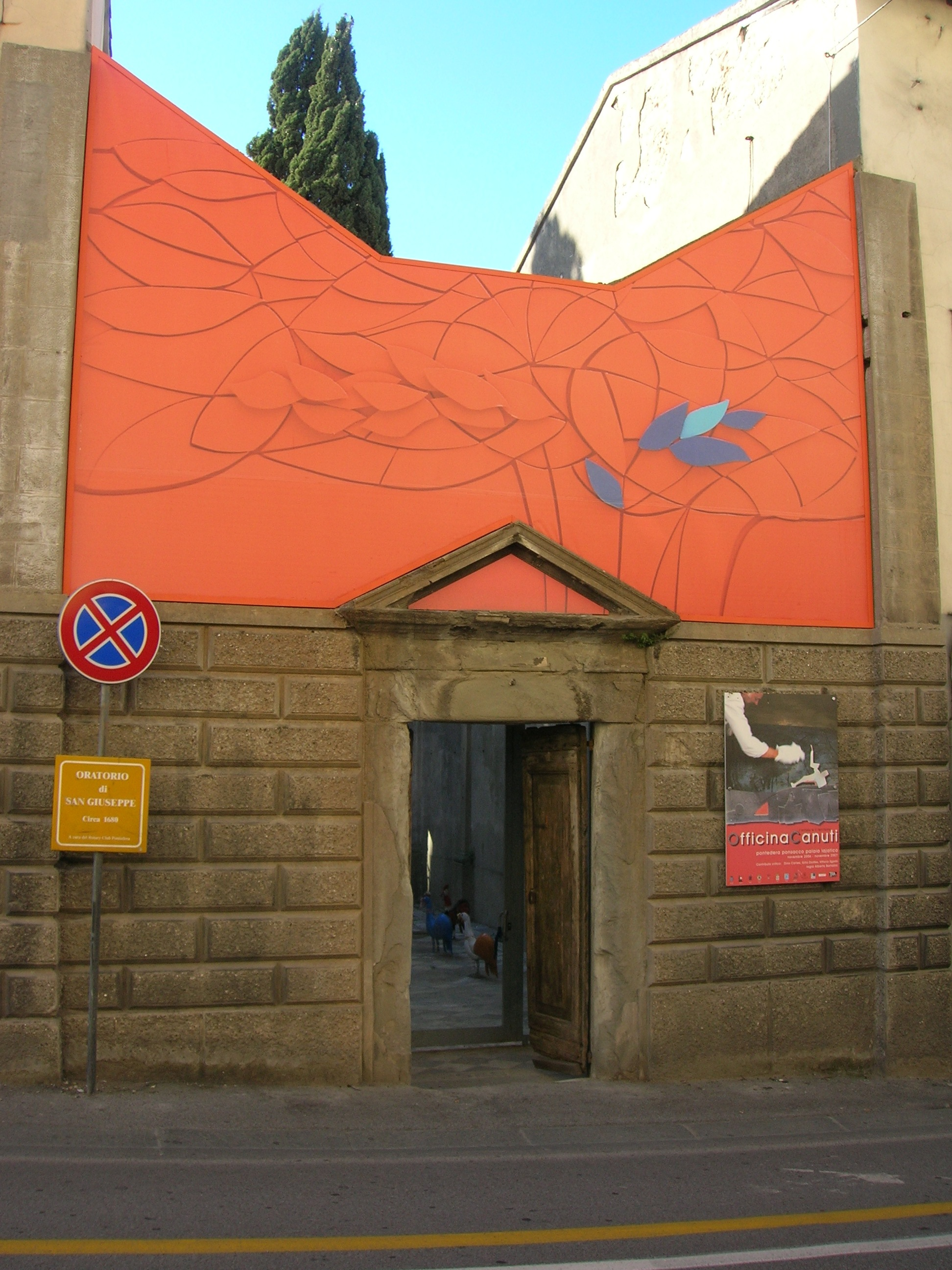 Pontedera - Oratorio San Giuseppe - Officina Canuti